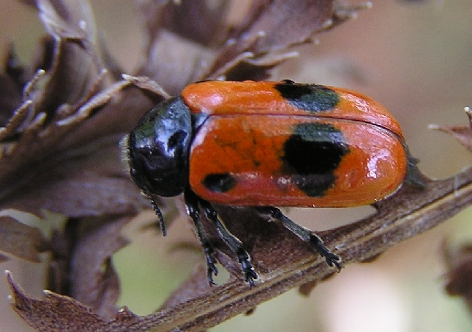 Clytra laeviuscula am Rheinufer bei Bonn